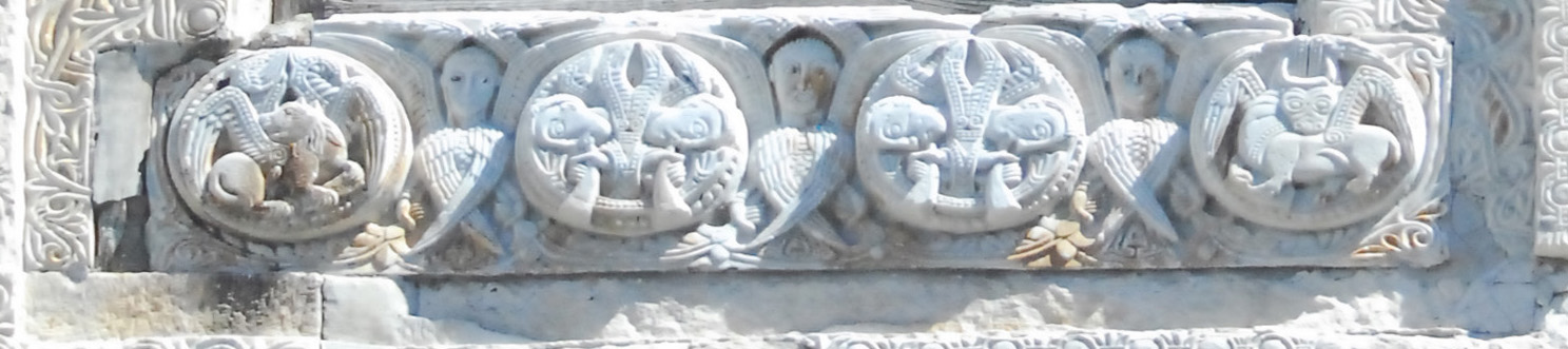 St-André-de-Sorède, unterer Fensterrahmen